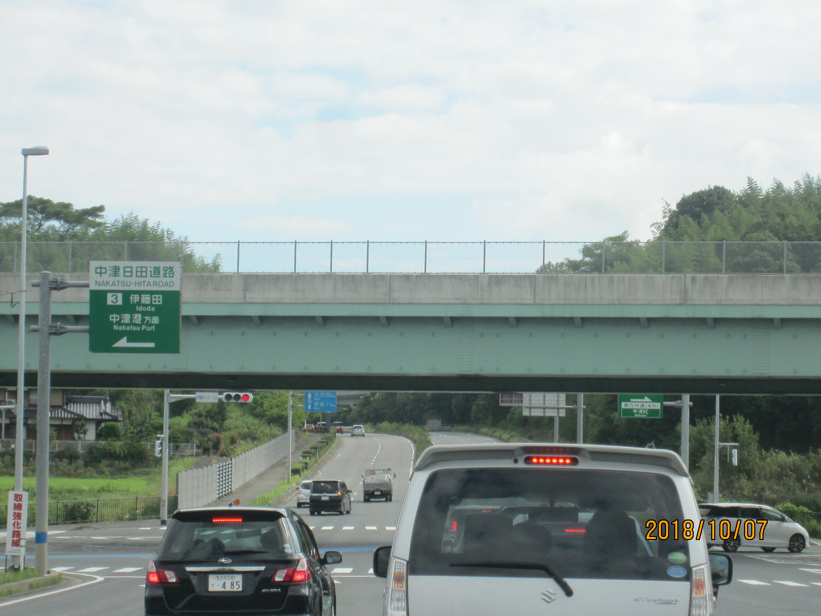 伊藤田インターチェンジの入口。